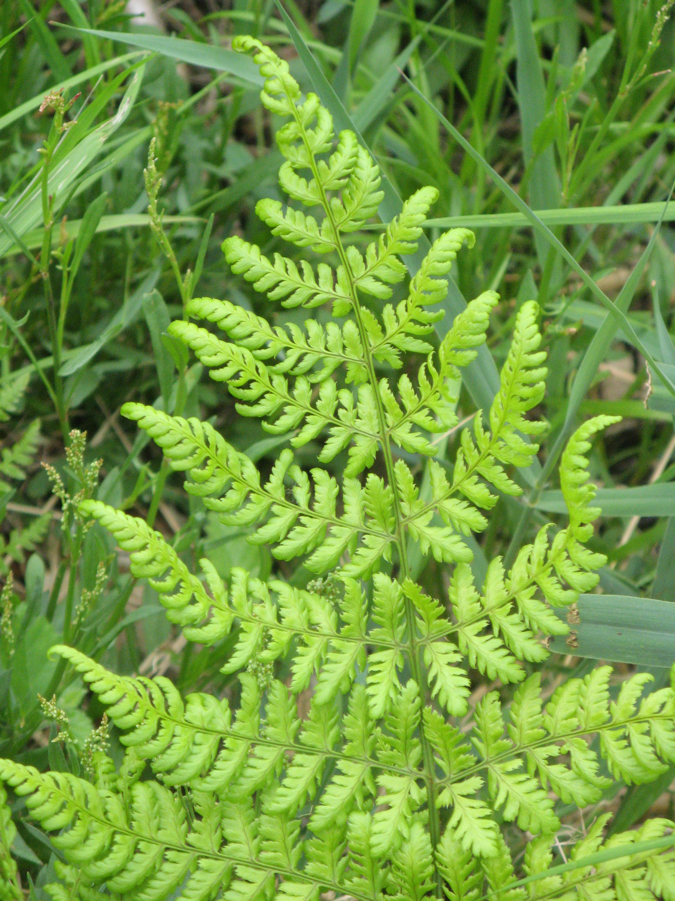 Naturschutzgebiet Weißes Moor in Neuenkirchen